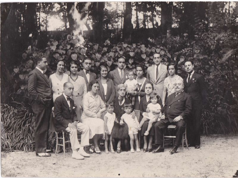 Familias Peinador Linès y Escardo Peinador en el Balneario de Mondariz en el verano de 1933 o 1934